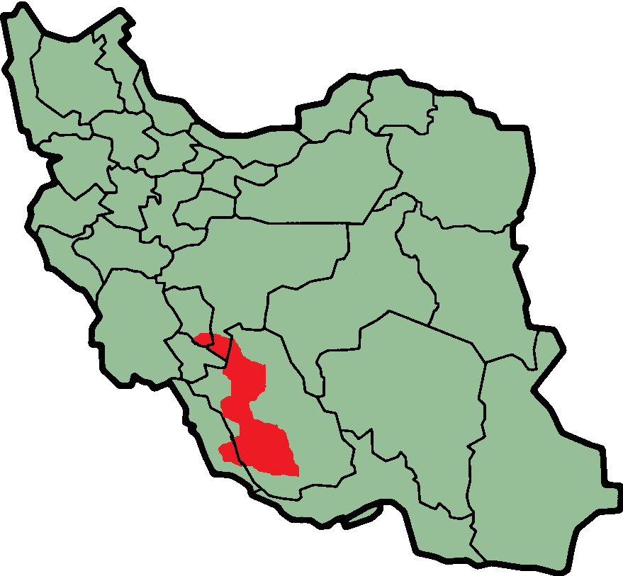 نقشه پراکندگی قشقایی ها در ایران بر اساس گزارش امور عشایری فارس